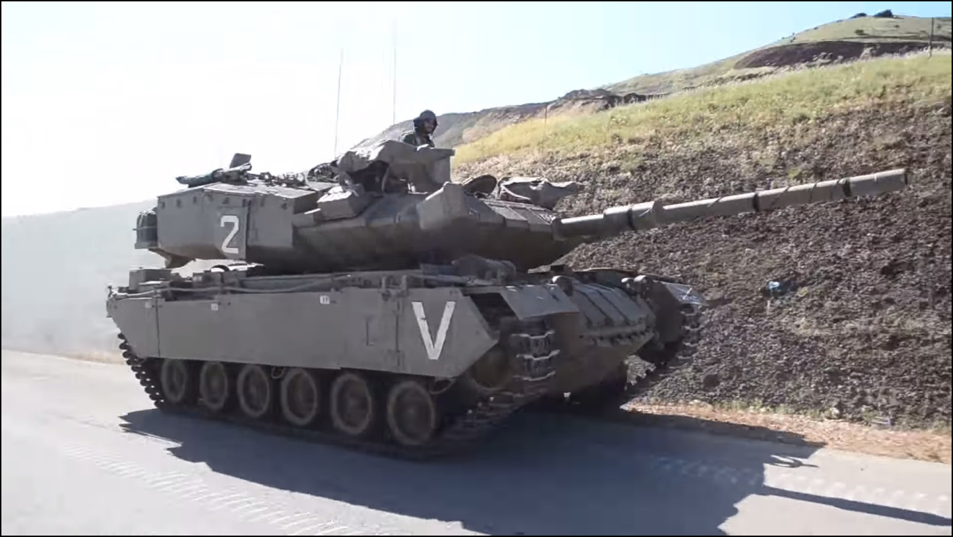 טנק פרא של חיל התותחנים